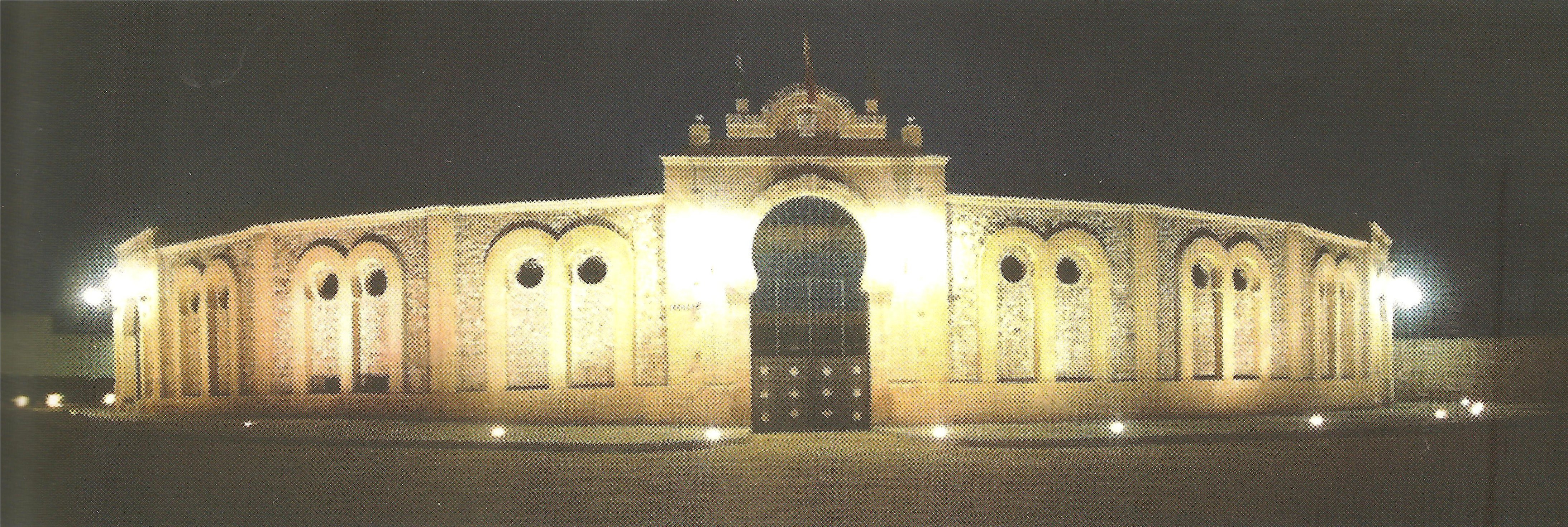 Imagen panorámica de la plaza de toros de Vera.